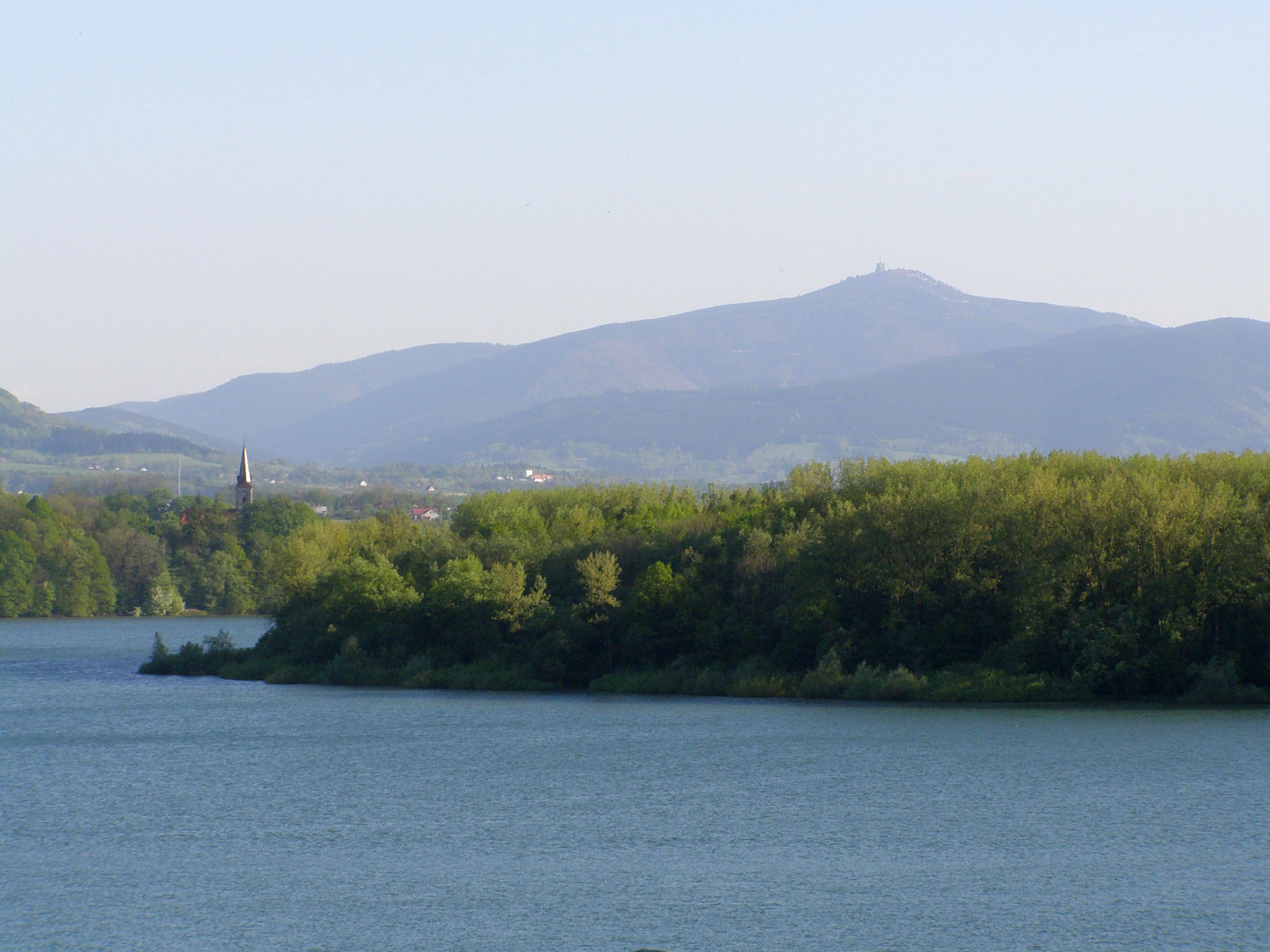 Soběšovice, Žermanická přehrada, v pozadí Lysohorská rozsocha